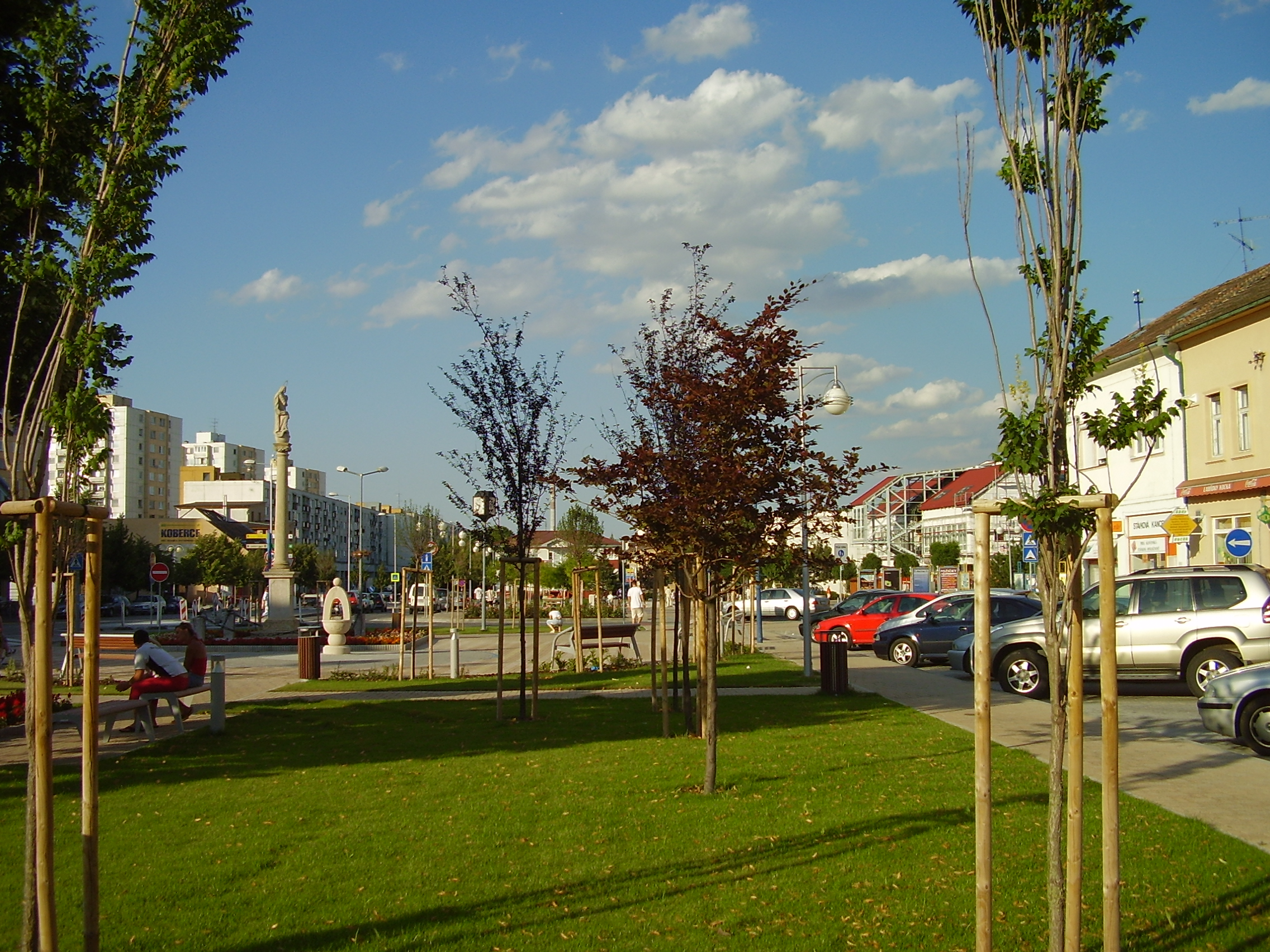 Senec